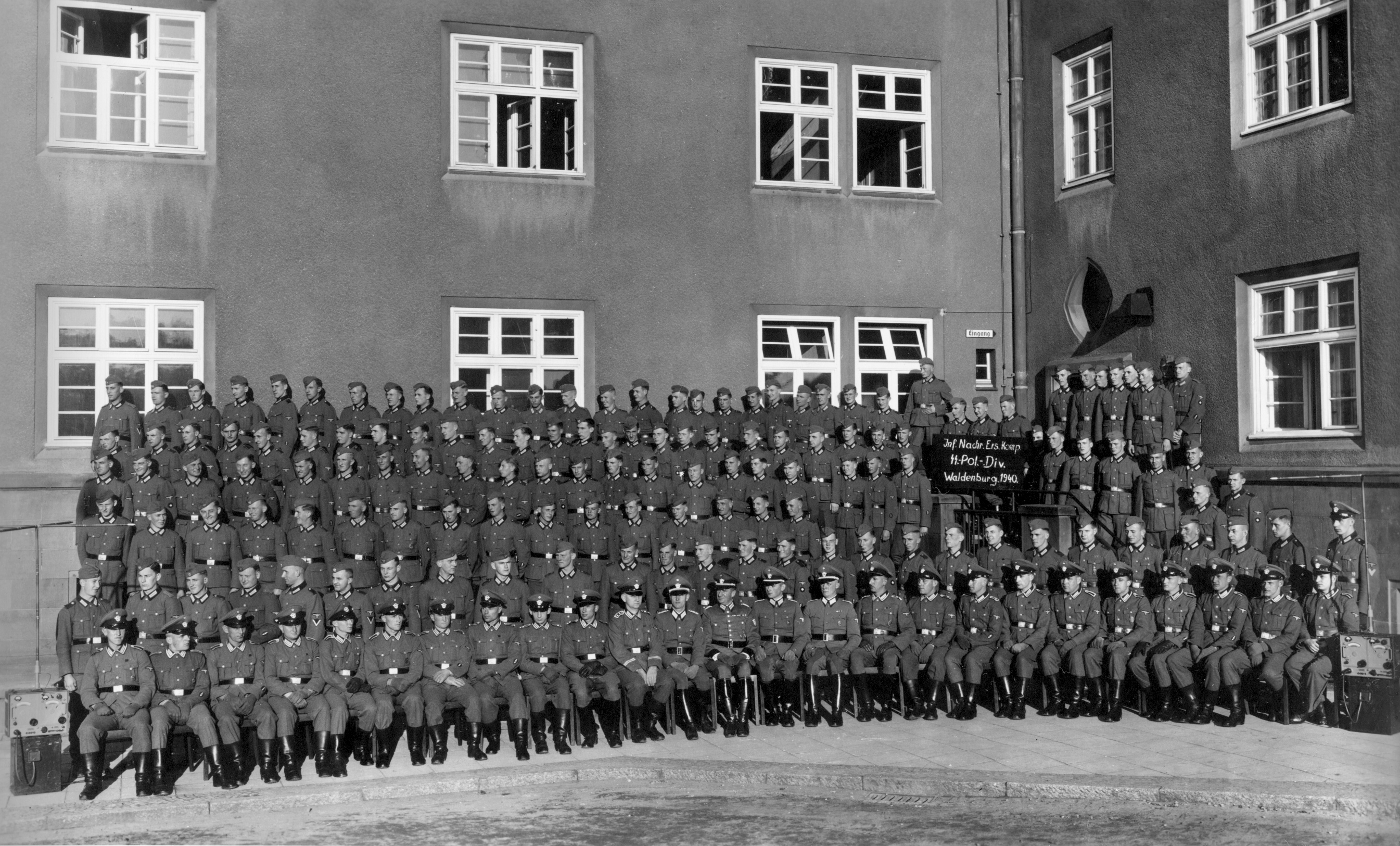 Gruppenbild der Infanterie Nachrichten Ersatz Kompanie der SS Polizei-Division - Waldenburg 1940